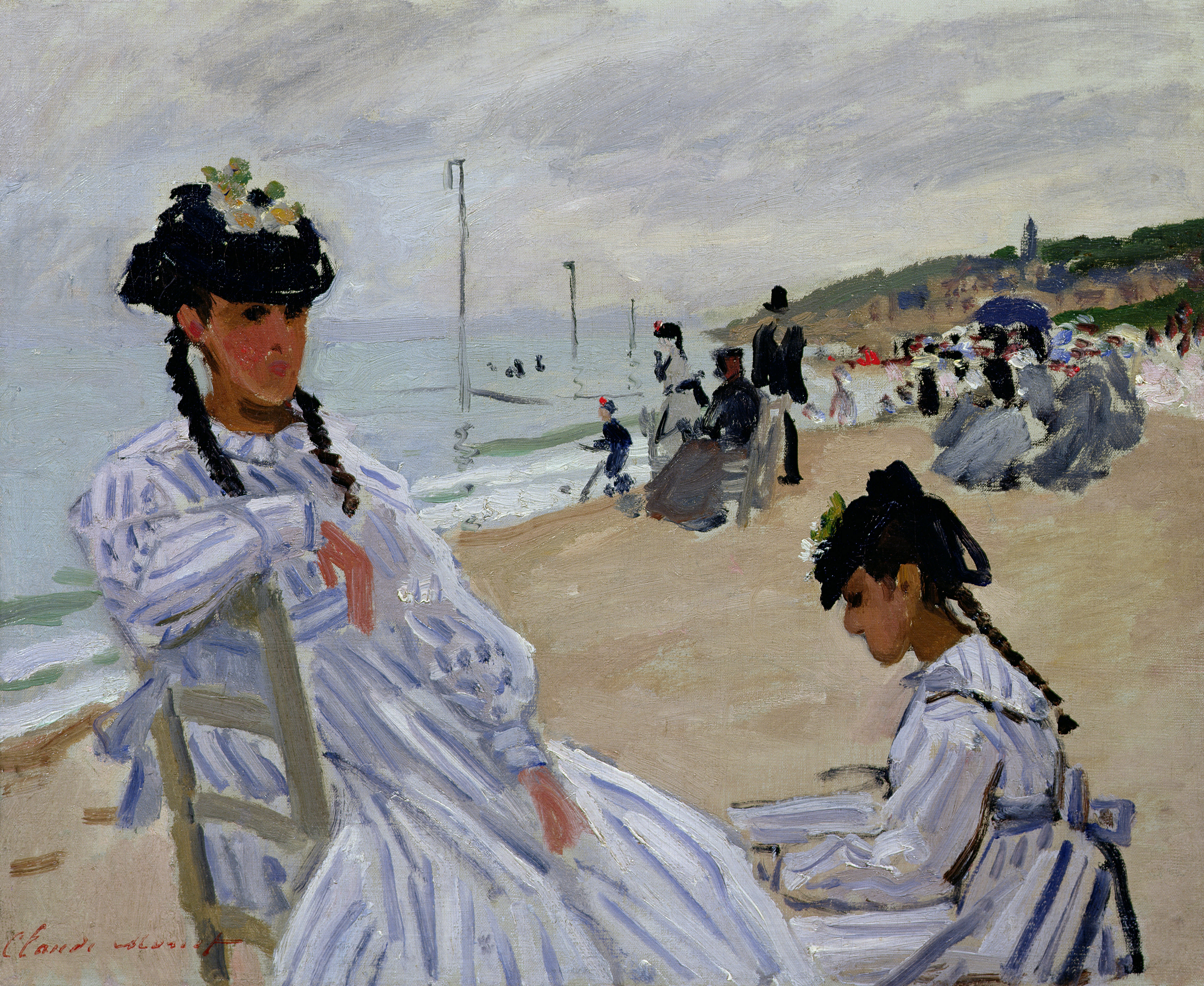 Am Strand von Trouville Öl auf Leinwand 38 x 46 cm